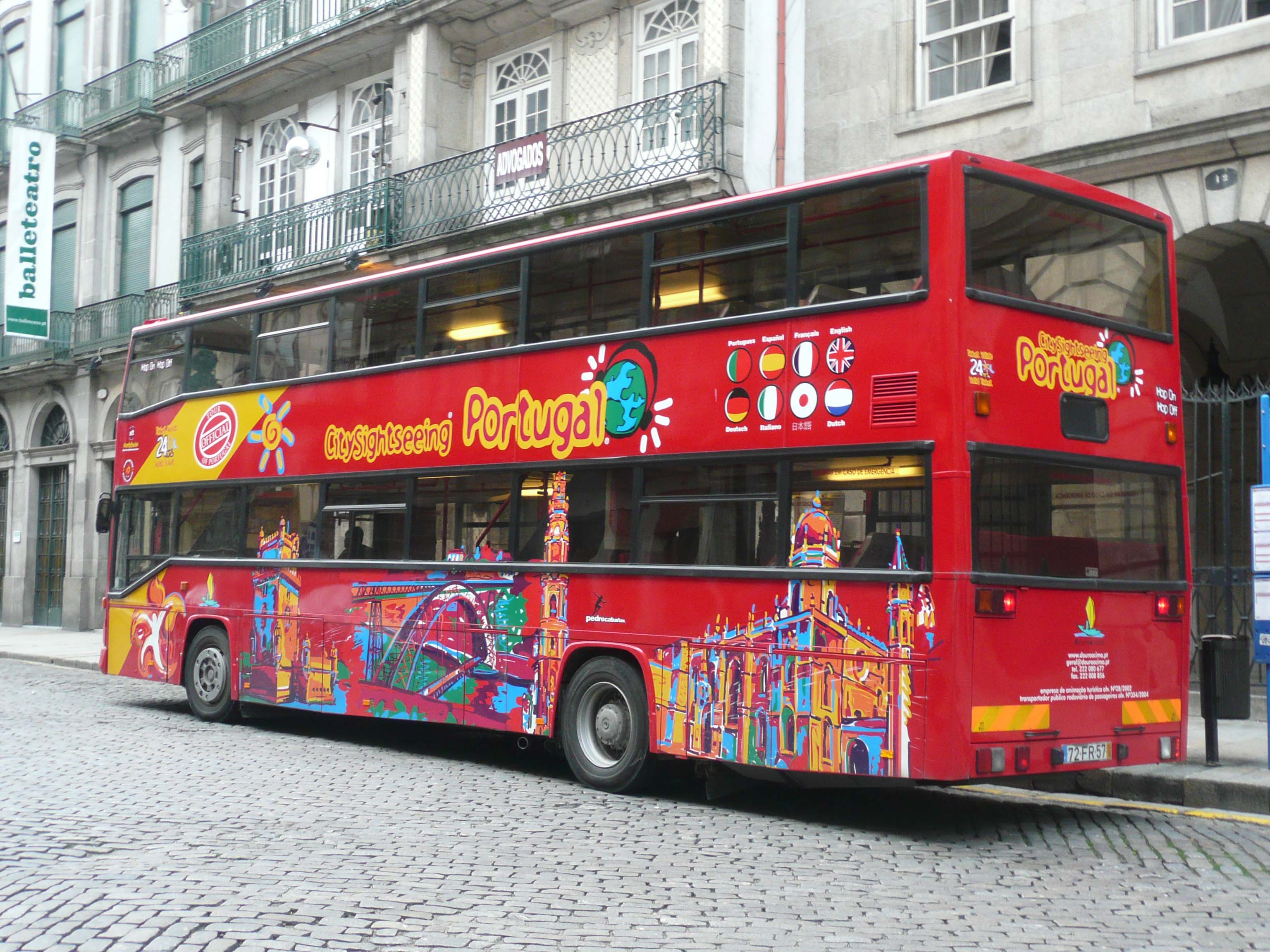 Otra buena forma de conocer la ciudad de Oporto puede ser en el Autobús turístico. Alquiler de coches en la estación de tren de Oporto con .